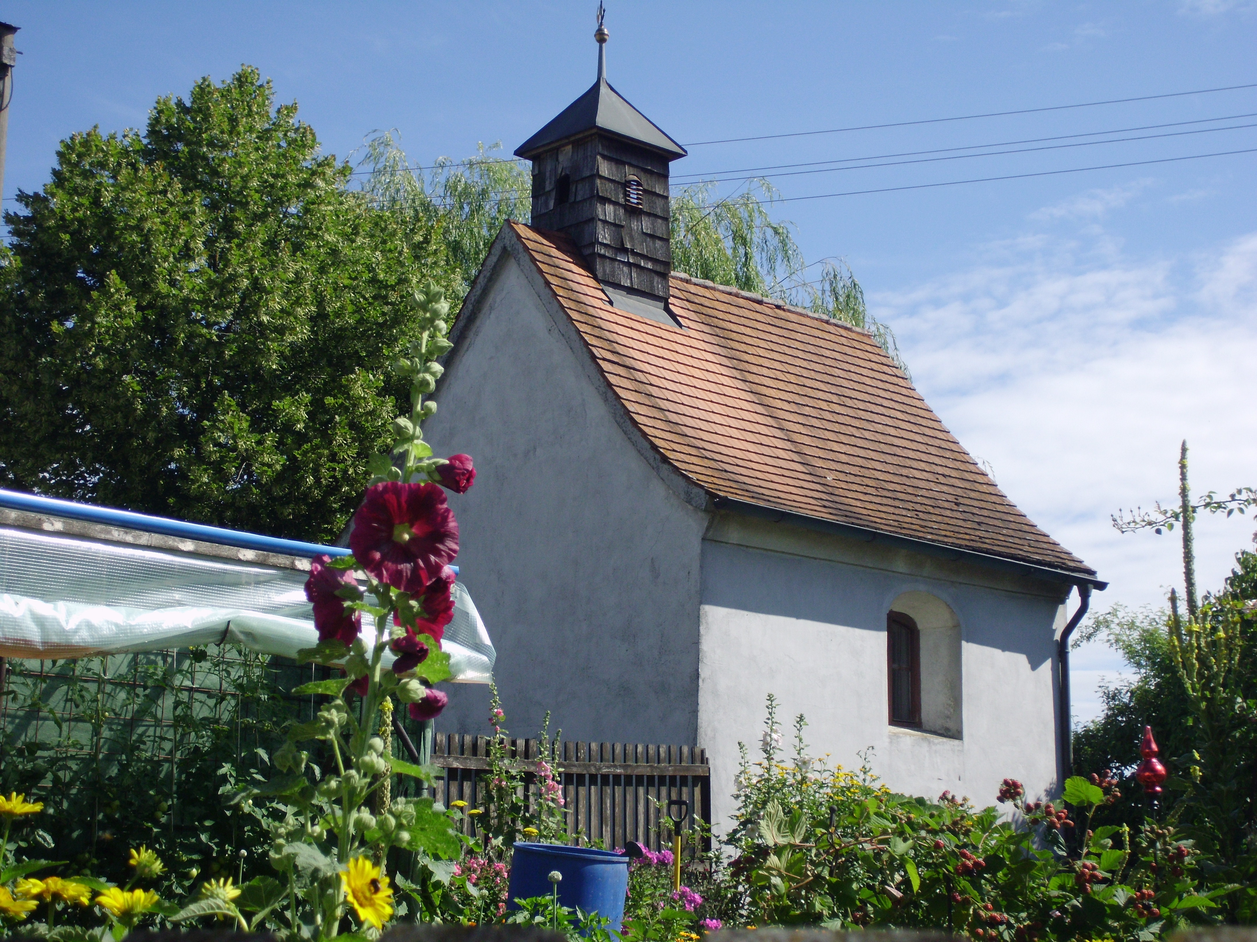 Asbrunn, Gemeindeteil von Rennertshofen im Landkreis Neuburg-Schrobenhausen, Ortskapelle